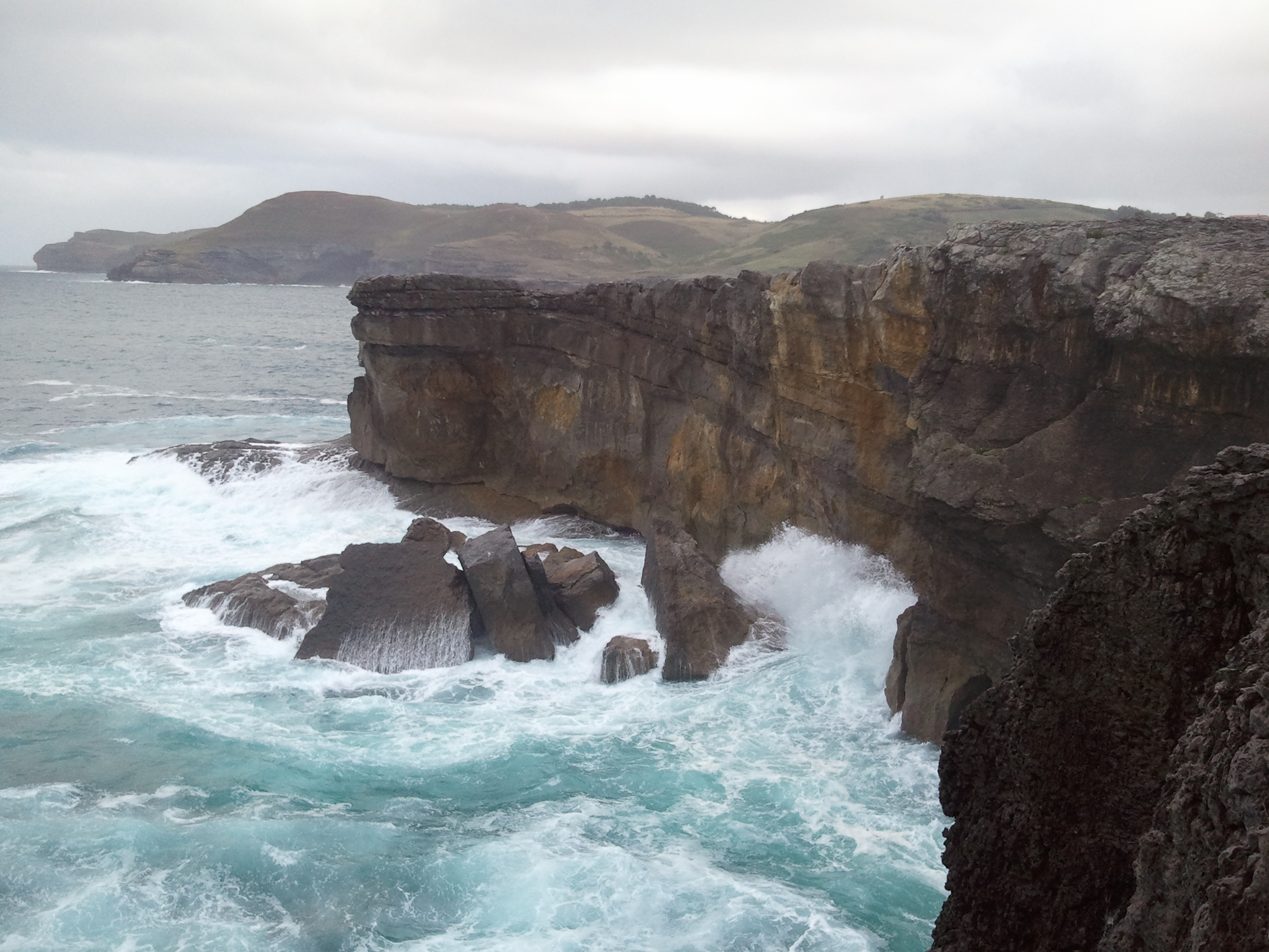 Vista del cabo de Ajo, en Cantabria.